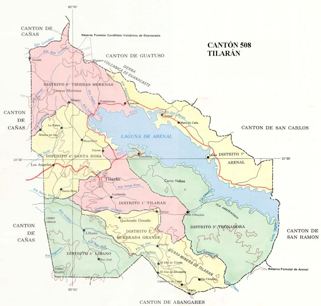 Mapa políitico cantón de Tilarán